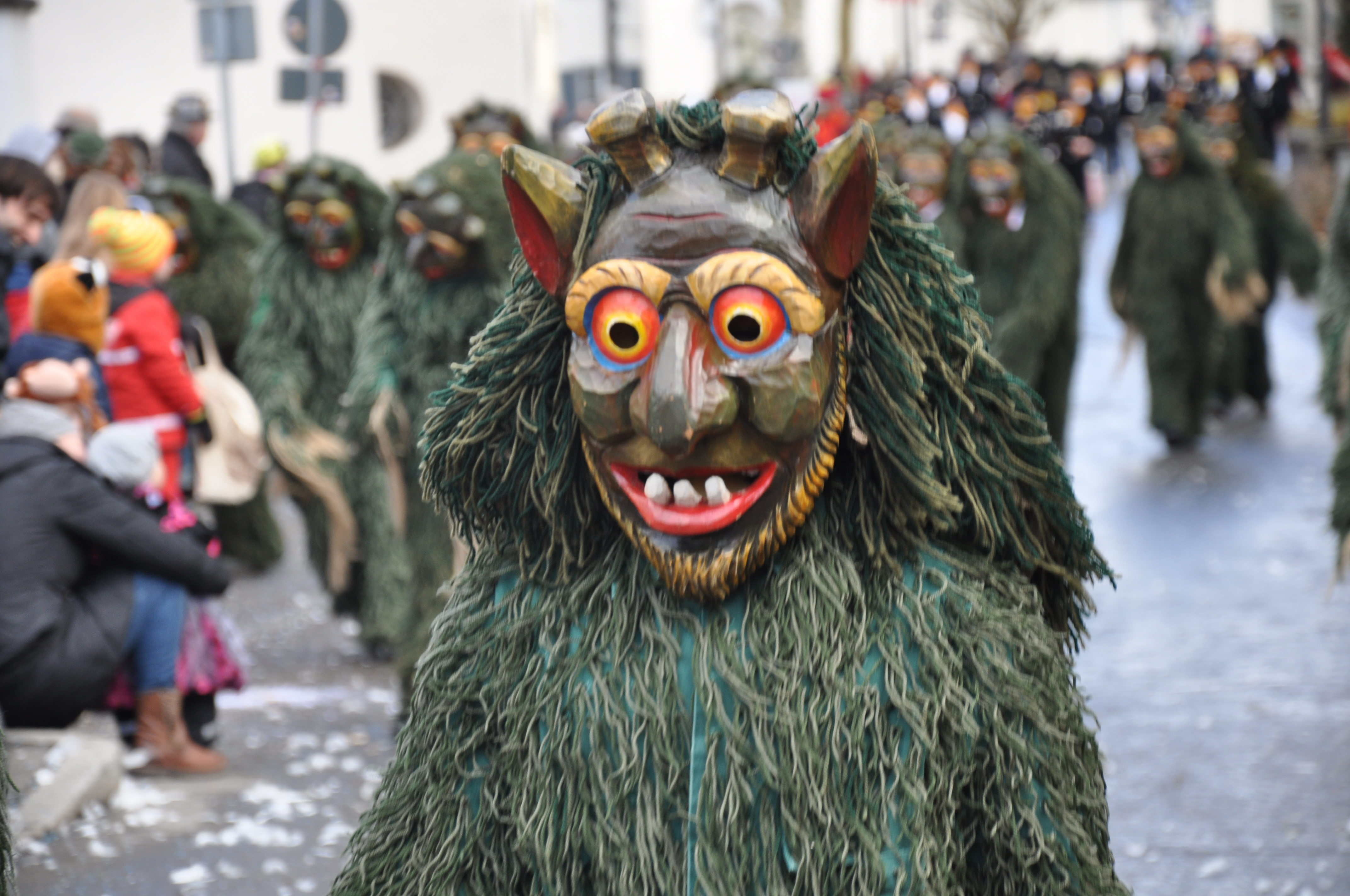 Narrengemeinschaft Hasle-Maale Stetten e. V.; Narrenfigur: Waldgeist Fotografiert beim Ringtreffen des Alemannischen Narrenrings (ANR) 2014 in Weingarten; Narrensprung am 9. Februar 2014